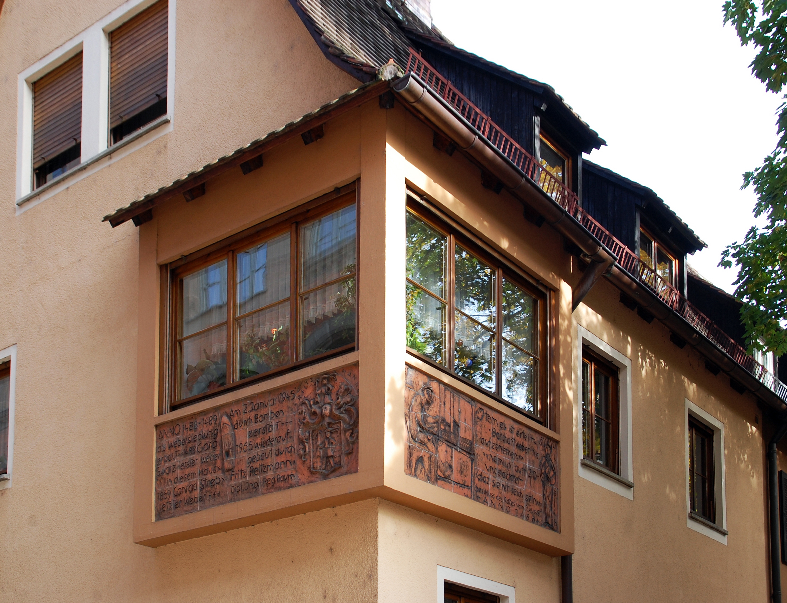 Erker an einem Haus der Sieben Zeilen, Baudenkmalensemble in Nürnberg